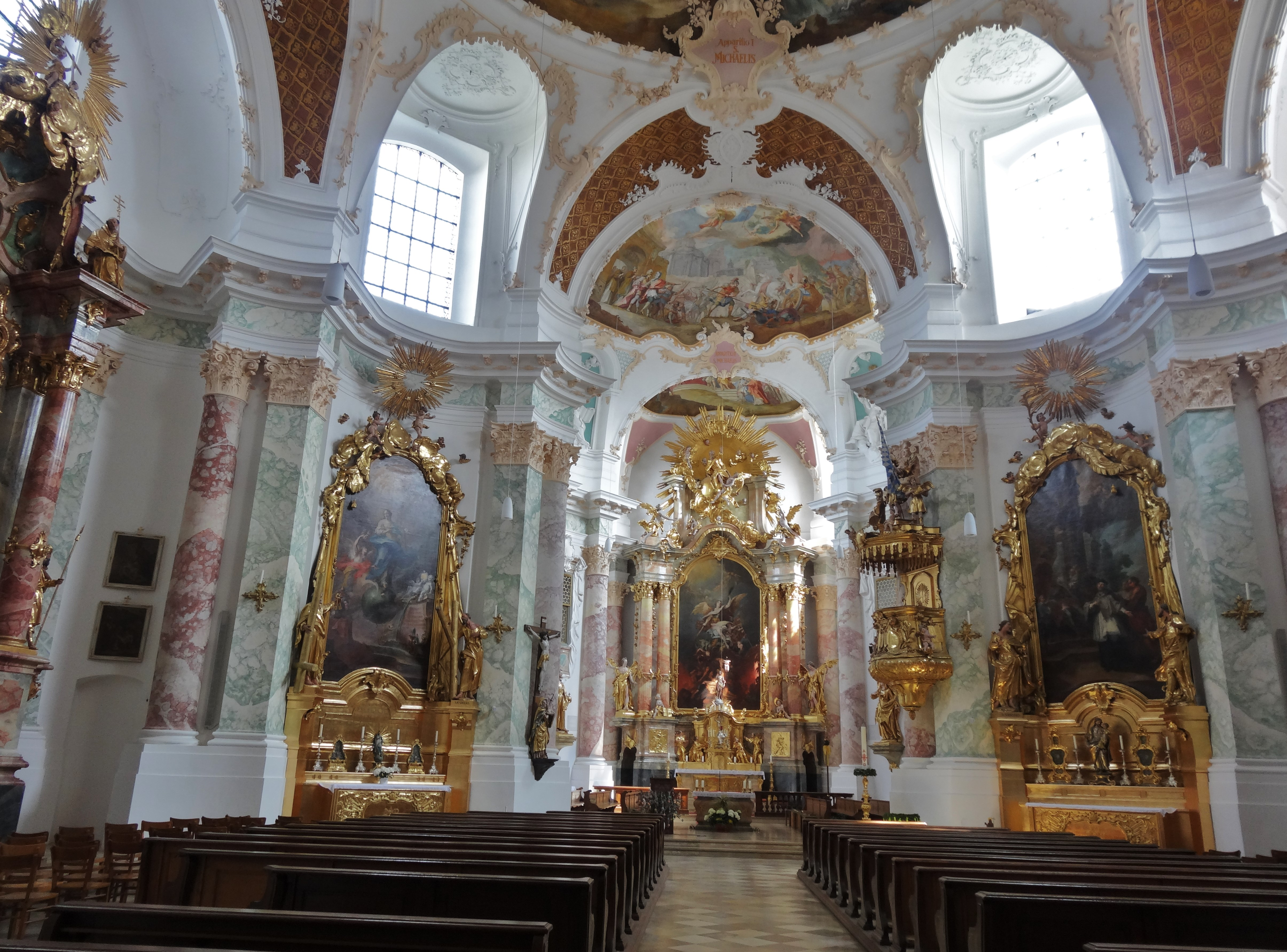 Pfarrkirche St. Michael (Berg am Laim), Innenansicht